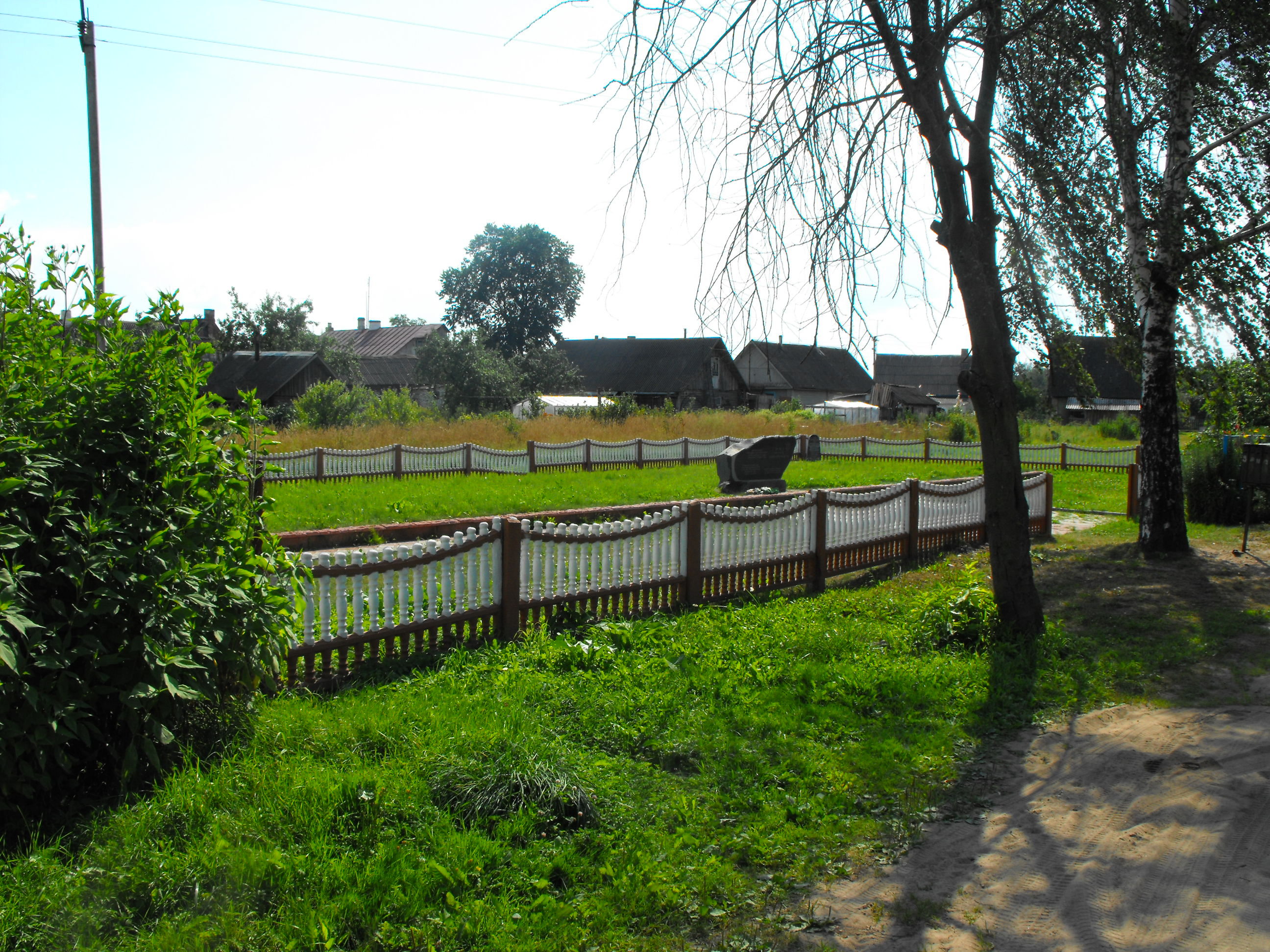 Памятник евреям Постав, убитым немецкими оккупантами и полицаями во время Холокоста. Находится в Поставах на улице Горького.